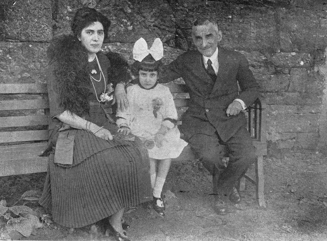 Andrés Avelino Montero Ríos y Villegas con su mujer y su hiza, fotografía en Vida Gallega 1920